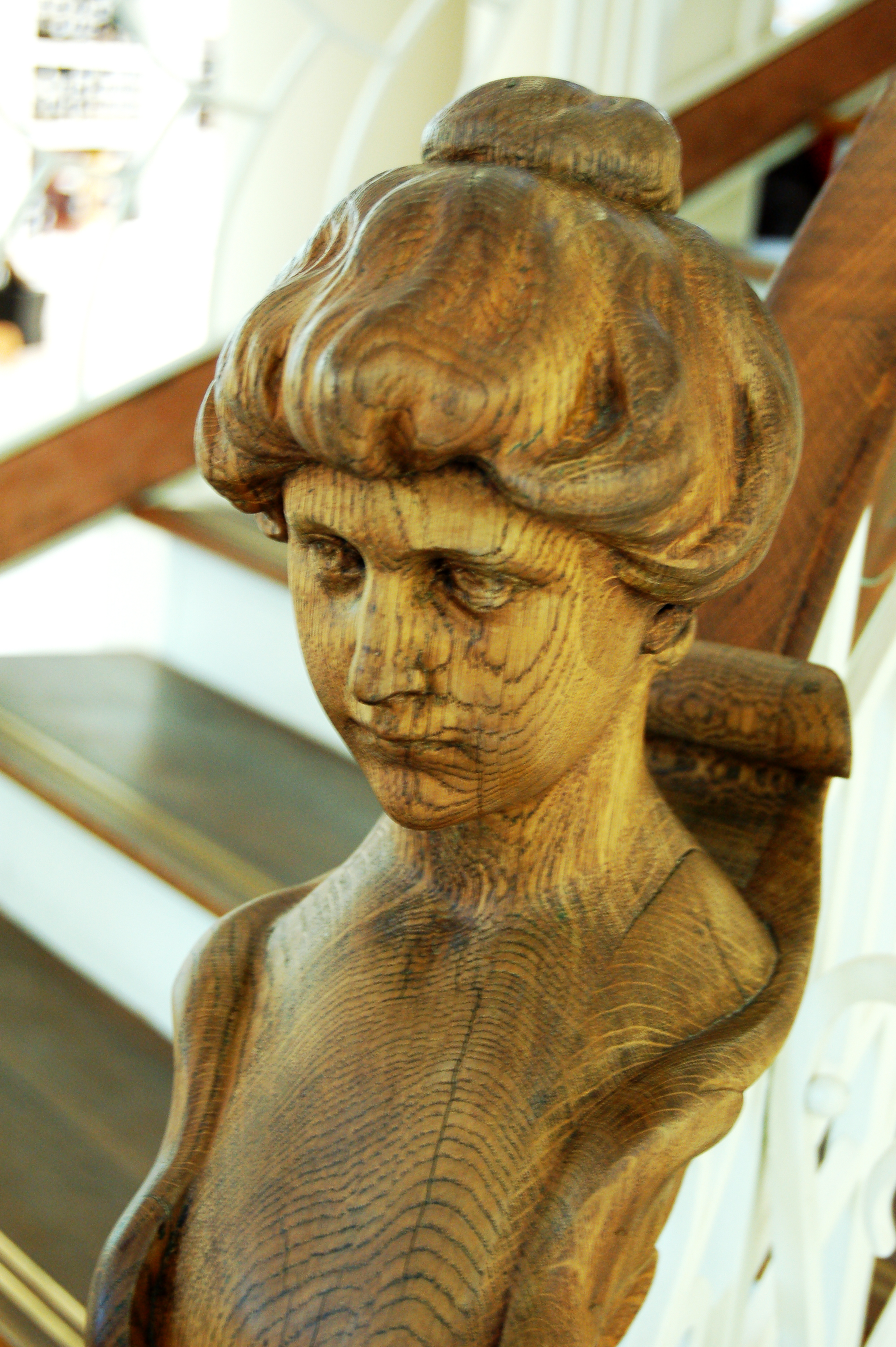 Detajl stopnišča, ženska podoba